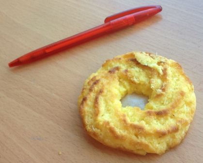 Een roomboter kokoskrans met eetpapier